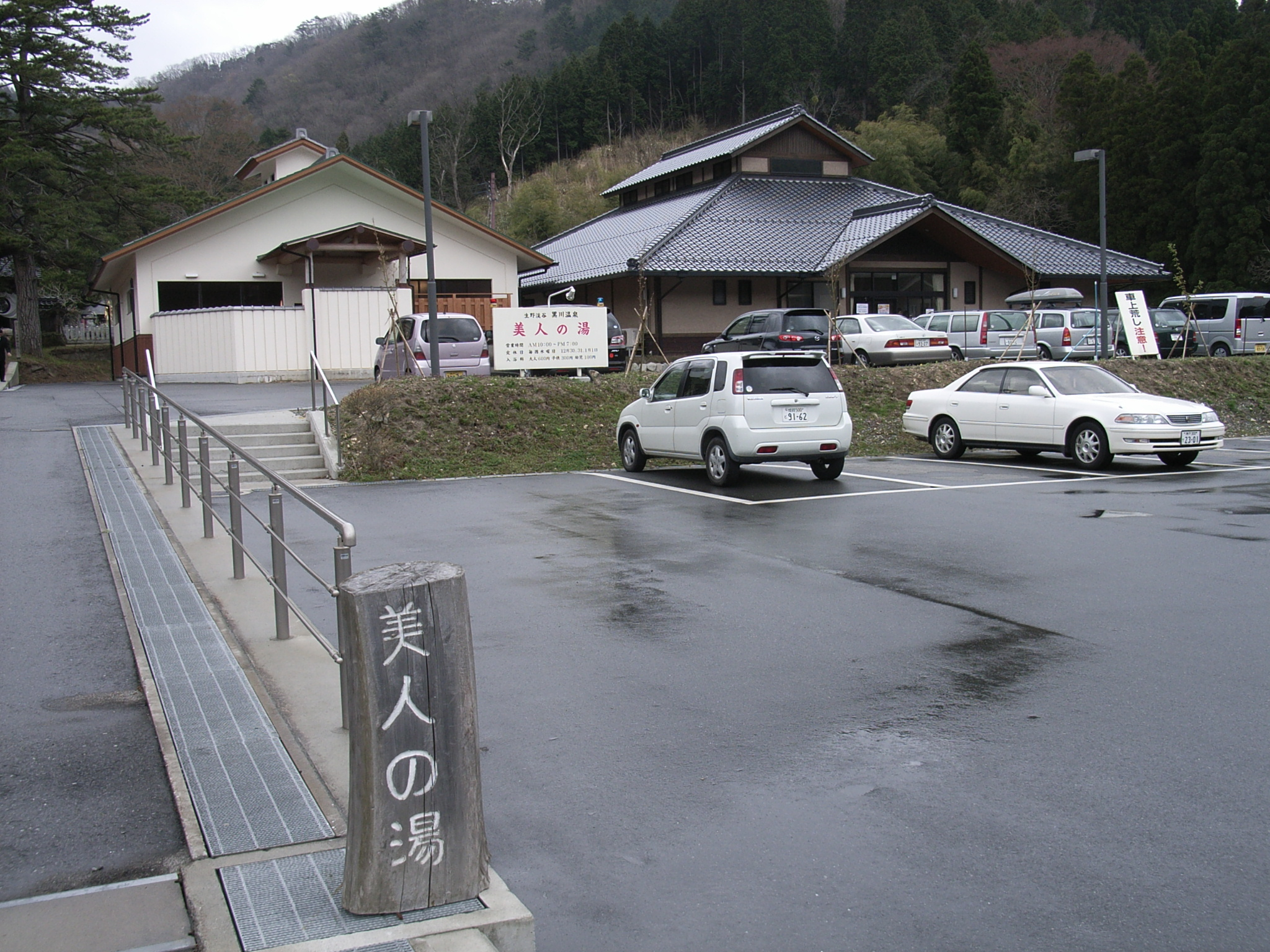 黒川温泉 ～photo by Autumn Snake 【おぉたむ すねィく探検隊】写真部門 担当 大原佳苗